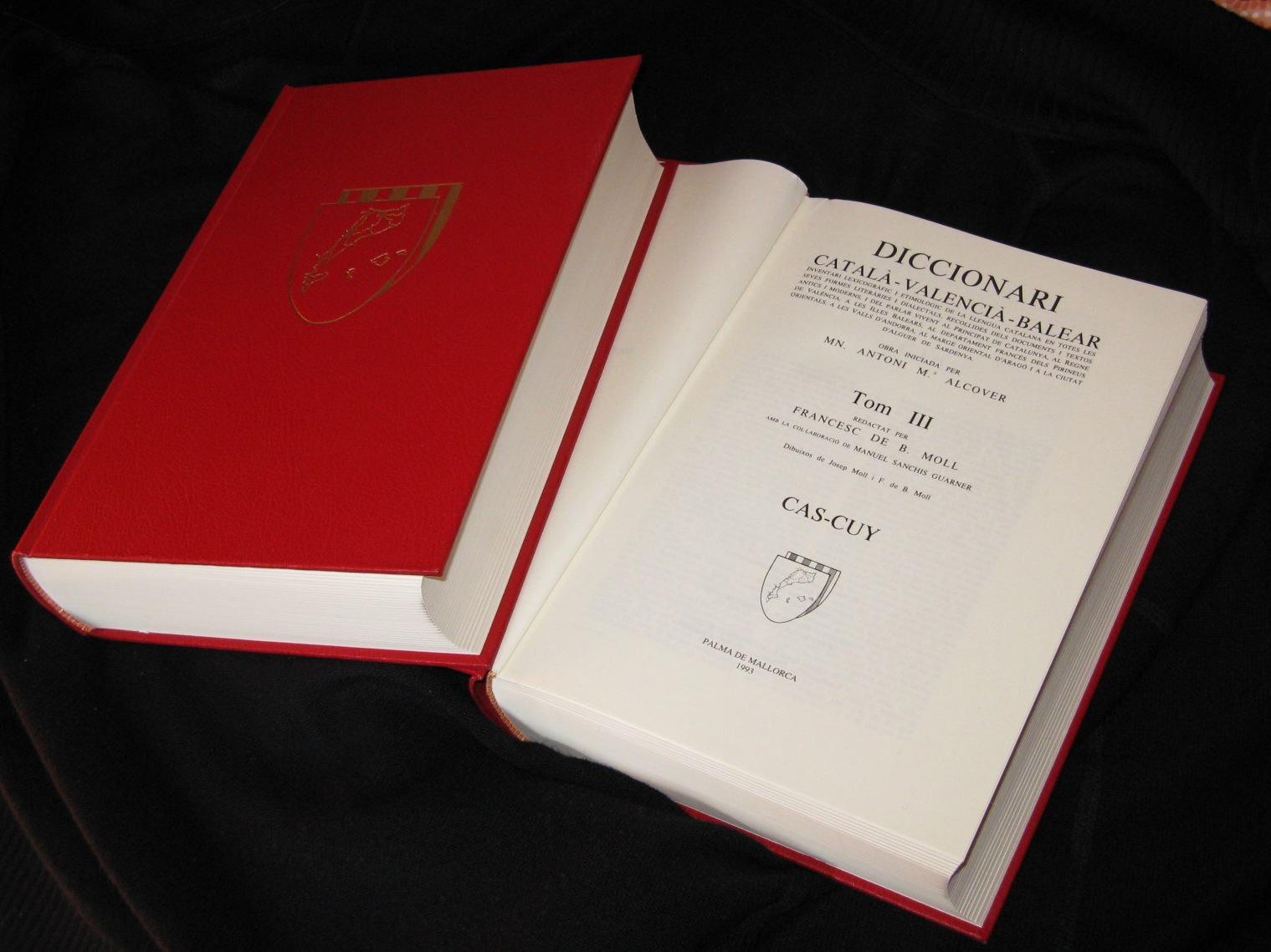 Dictionary català_valencià_balear